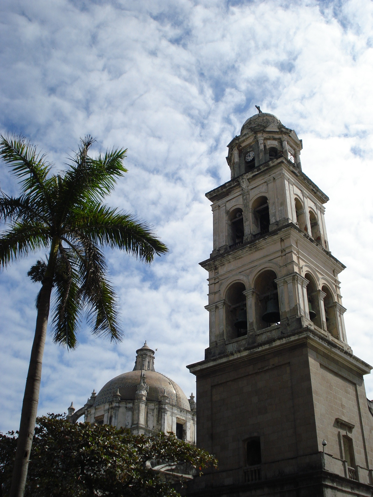 La catedral del hermoso puerto de Veracruz